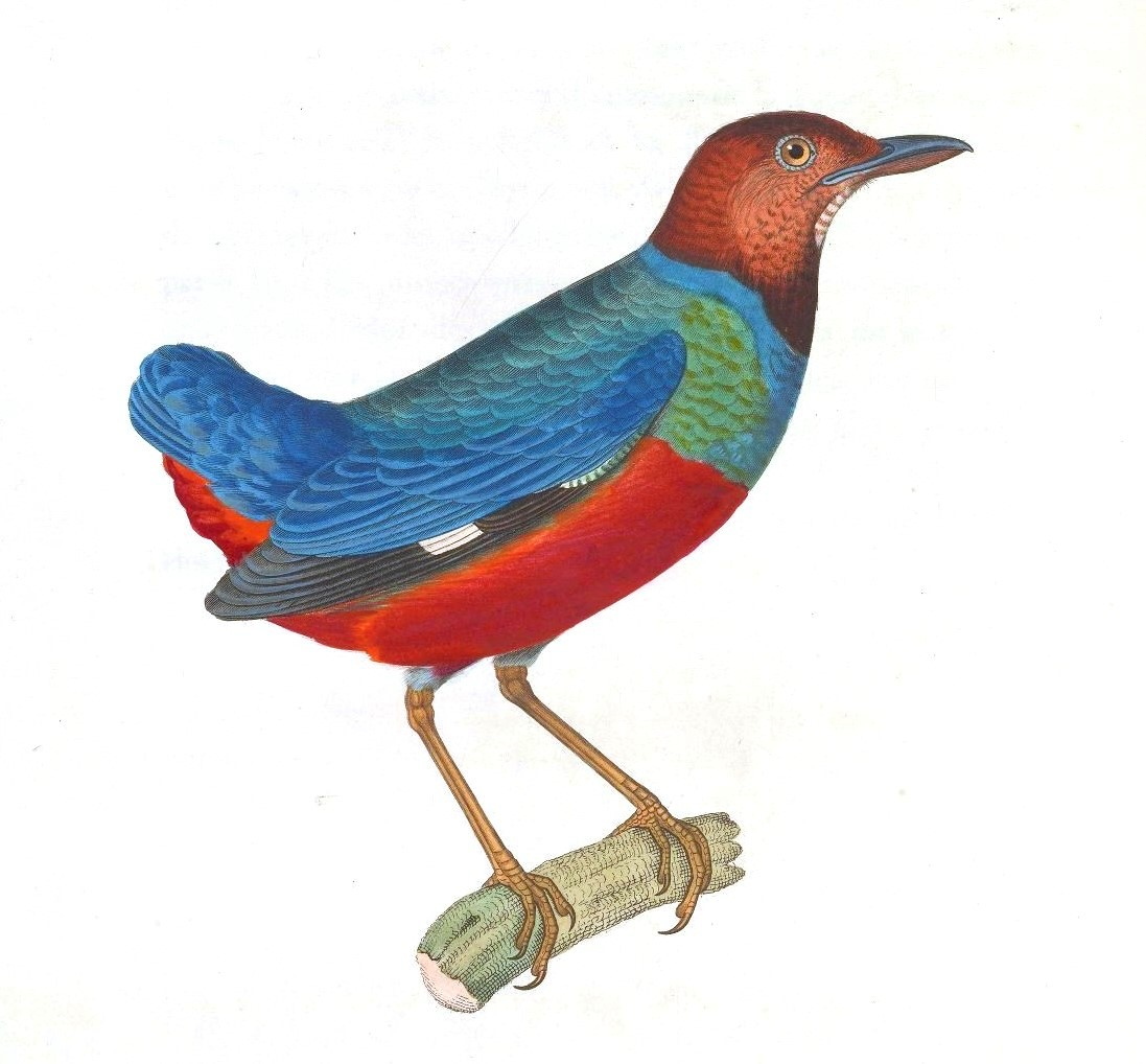 212. Brêve à ventre rouge, mâle Huet. Pitta erythrogaster Cuv. L'Adulte. – Planche 212